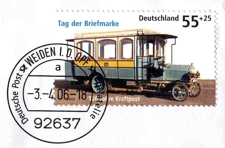 Stamp description / Briefmarkenbeschreibung Tag der Briefmarke 2006 Tag der Briefmarke - 100 Jahre Kraftpost Ausgabepreis: 55 + 25 Eurocent First Day of Issue / Erstausgabetag: 12. Mai 2005 Größe: 46,00 x 27,32 mm Auflage: xxx Stück Entwurf: Gerda M. Neumann und Horst F. Neumann, Wuppertal Bildvorlage: Museum für Kommunikation in Nürnberg Druckverfahren: Mehrfarben-Offsetdruck der Bundesdruckerei GmbH, Berlin Michel-Katalog-Nr: Ländercode-MiNr: 2456 description / Stempelbeschreibung Stempelort: Weiden in der Oberpfalz Randtext: Deutsche Post / Posthorn / WEIDEN I.D.OPF / Posthorn / Philatelie Postleitzahl: 92637 Stempeldatum: 03.04.2006 - 18 Uhr Stempelbuchstabe: a